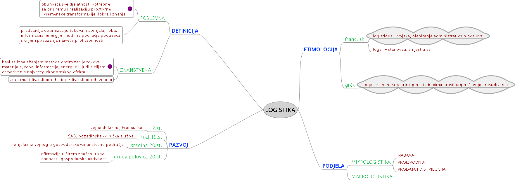 Mentalna mapa - Logistika općenito